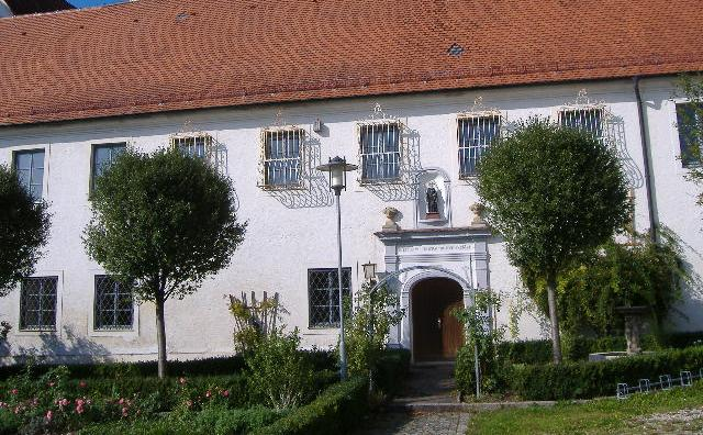 Unterliezheim